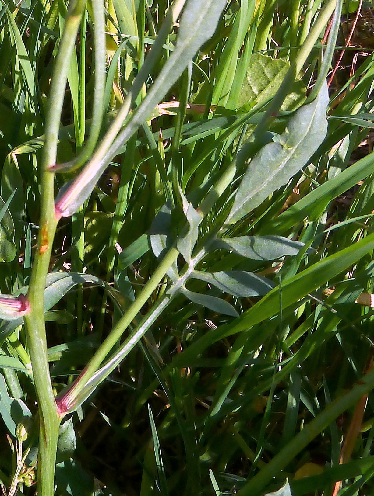 Podospermum laciniatum - Hoja pinnatipartida - Camino de la Azarbe de Patricio, Albatera (Provincia de Alicante, España).